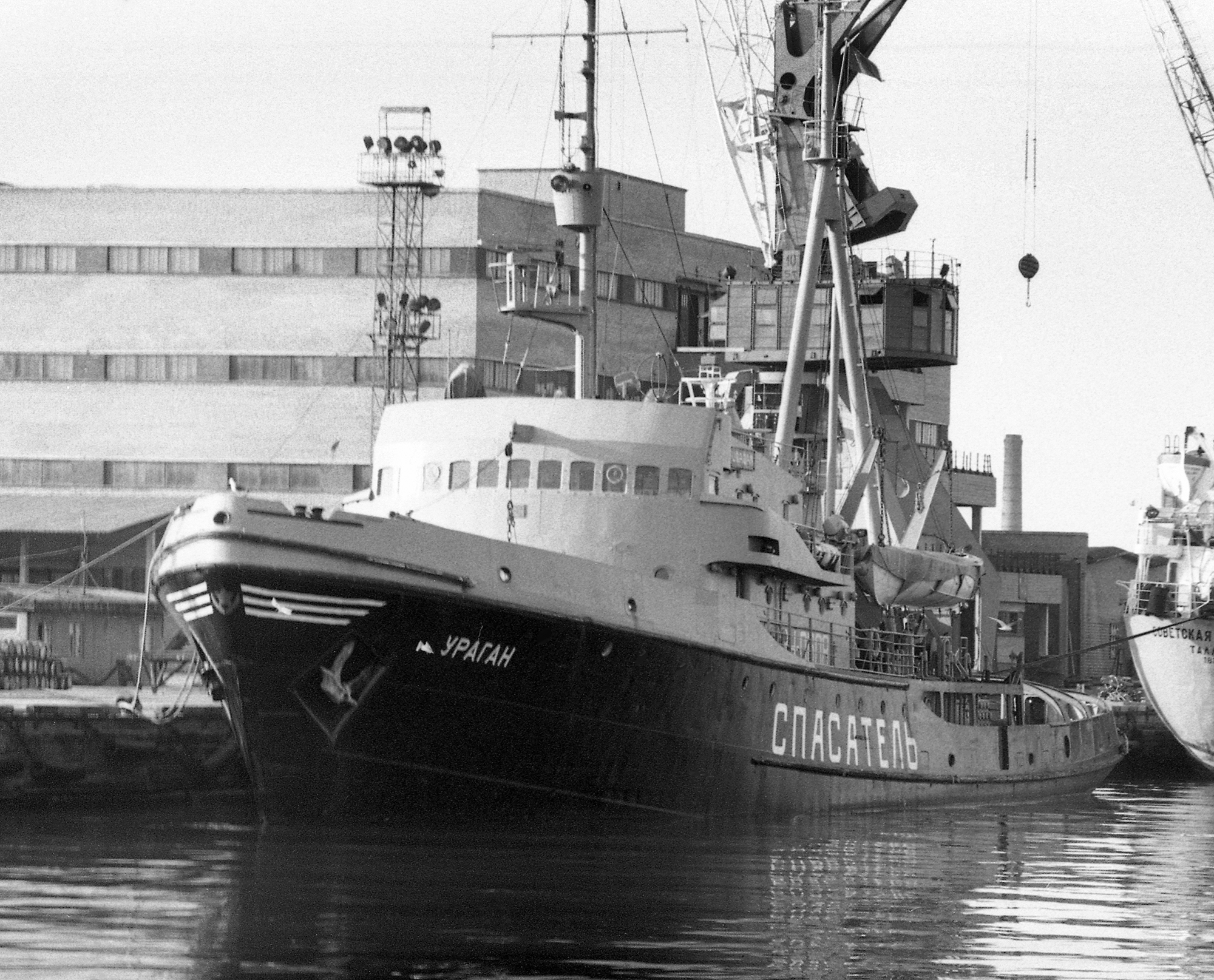 Uragan, päästelaev, Paljassaare sadamas 88